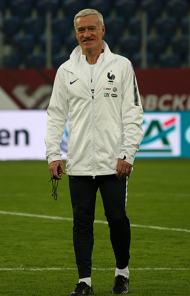 Звёзды сборной Франции готовятся к матчу с Россией